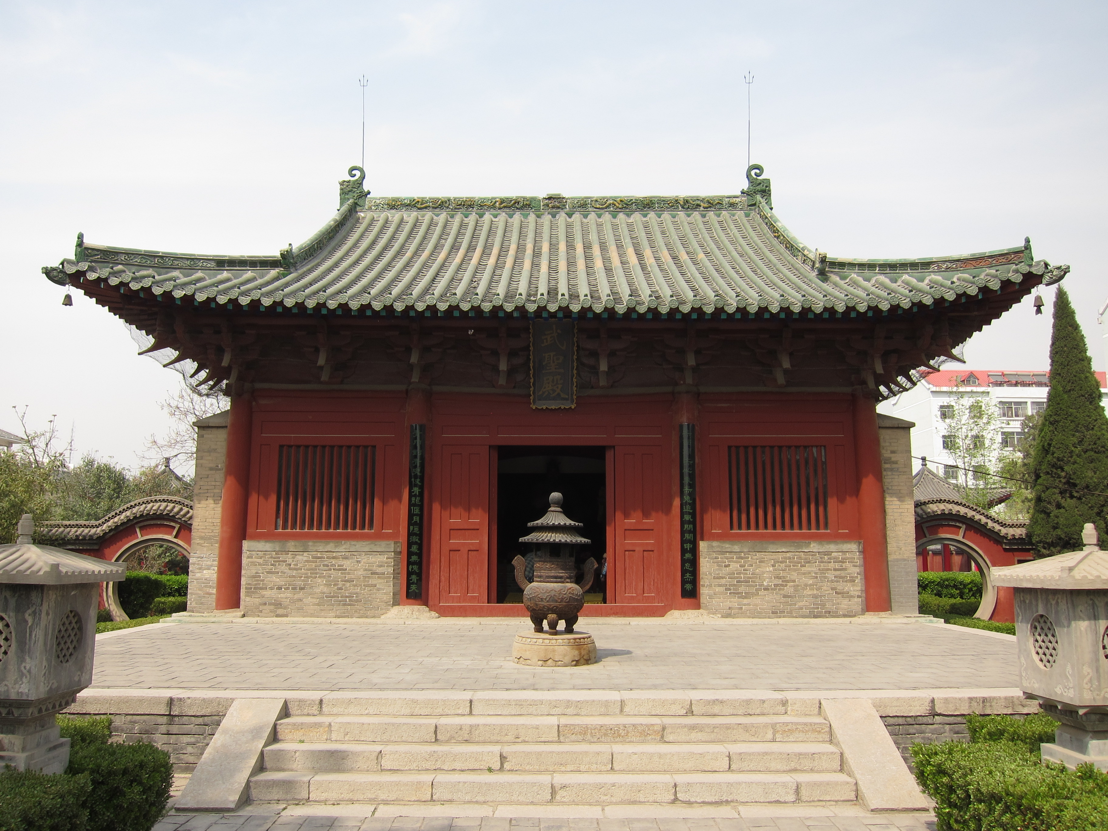 山東省廣饒縣關帝廟大殿，建於宋建炎二年（1128年），在今廣饒縣孫武祠內，是山東省境內現存年代最早的木結構建築。